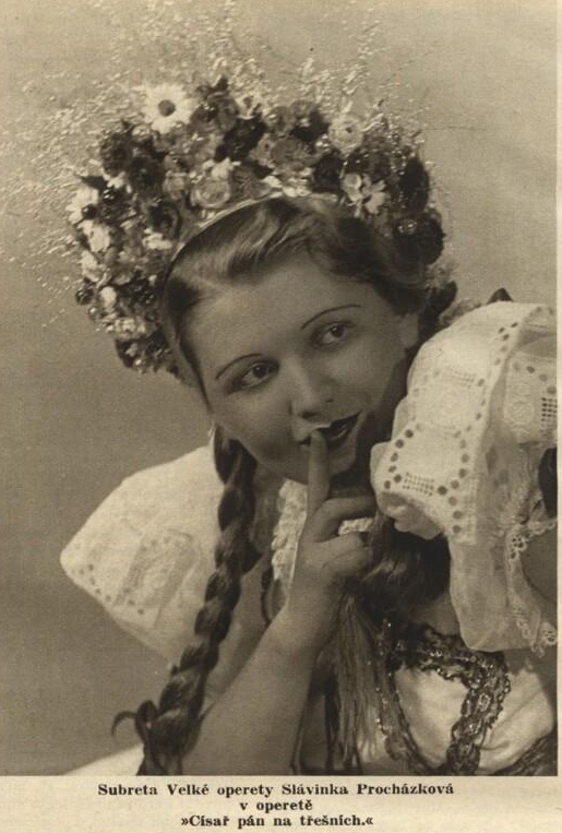 Polách, Kožík: Císař pán na třešních (Velká opereta Praha, 1937, Slávka Procházková)